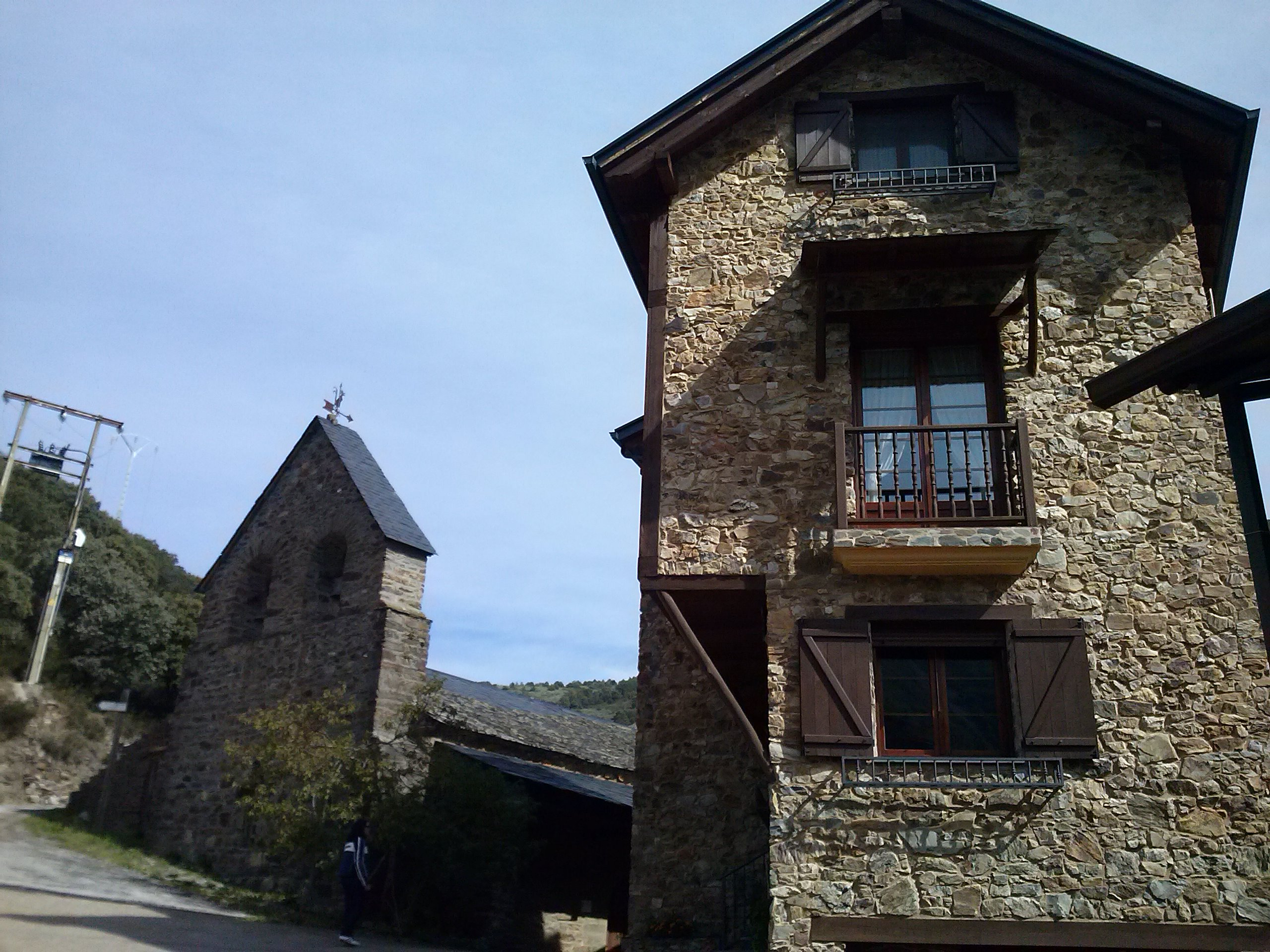 San Facundo, en el municipio de Torre del Bierzo (León, España).